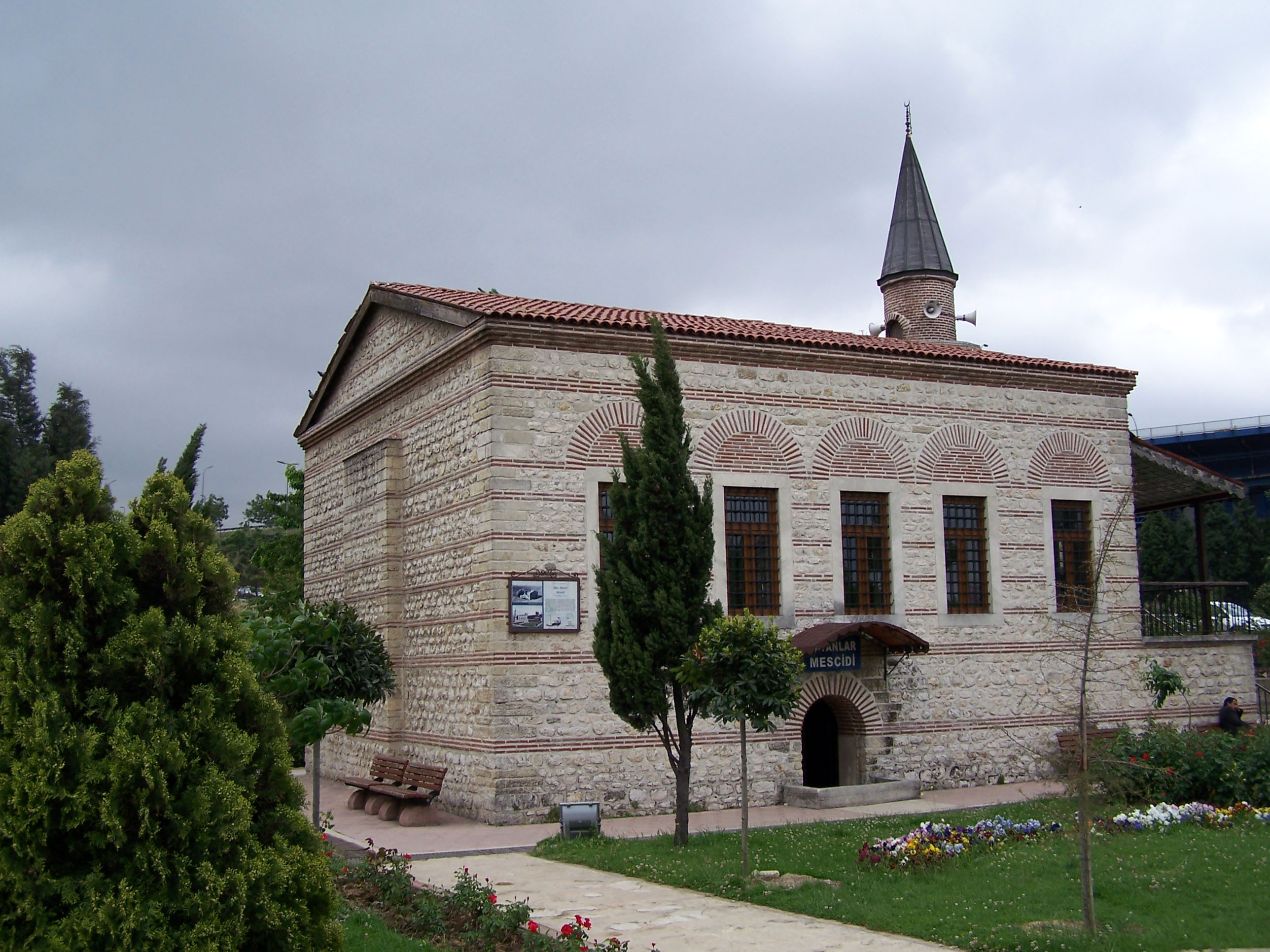 Hacı Hüsrev Mescidi in Eyüp